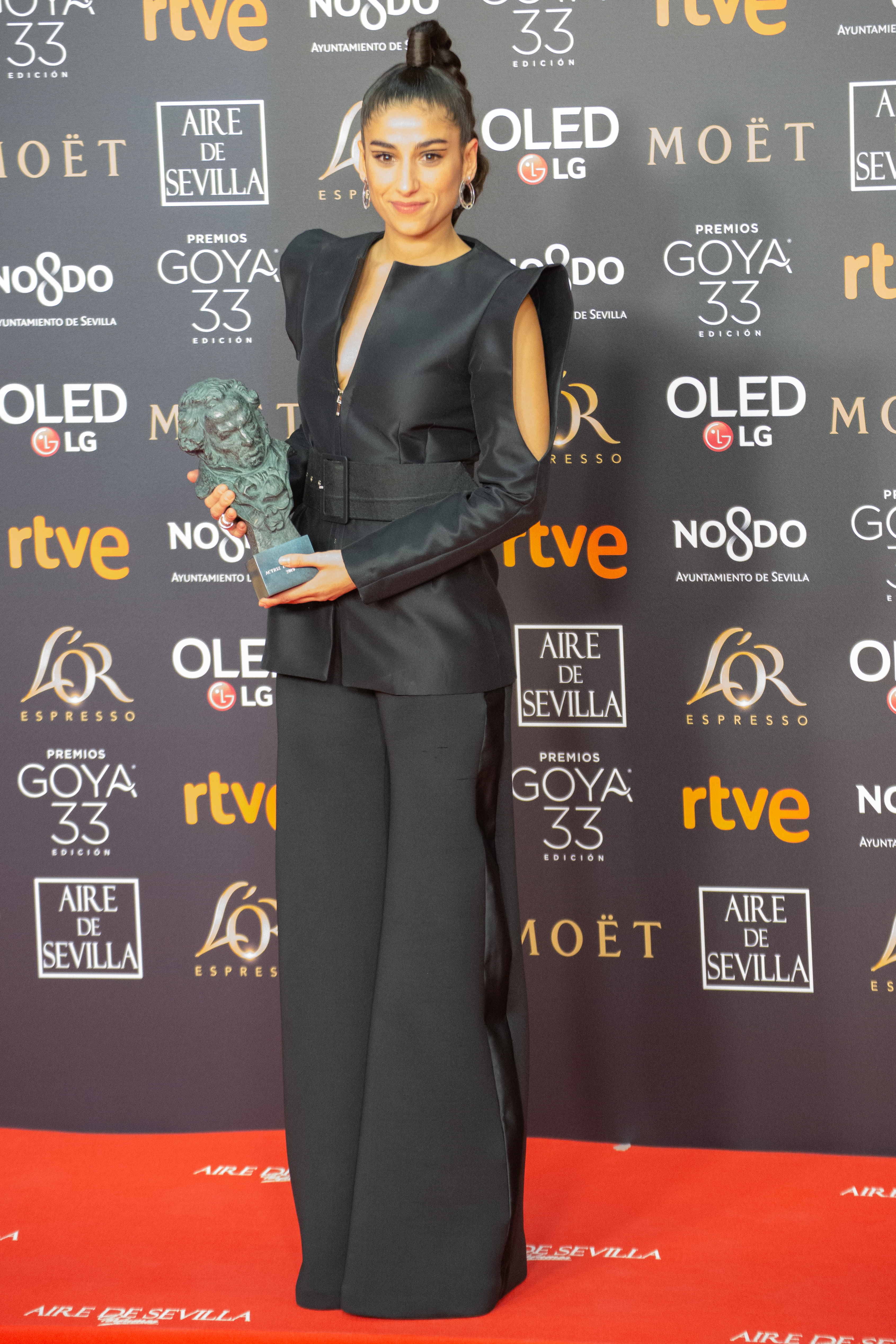 Ganadora de los Premios Goya Mejor Actriz de Reparto por el papel de Paqui en "Carmen y Lola"